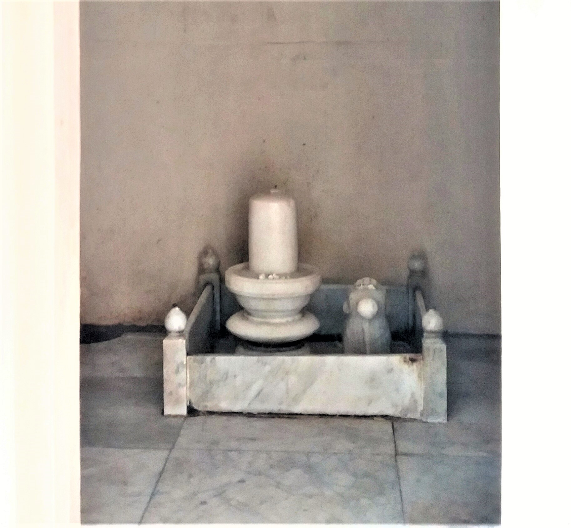 ঢাকেশ্বরী মন্দির প্রাঙ্গণে শিবলিঙ্গ ও নন্দী